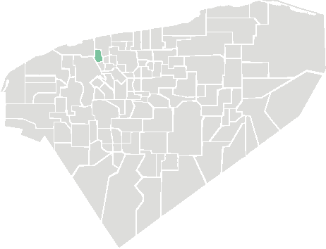 locatie van de gemeente Chicxulub Pueblo in Yucatán